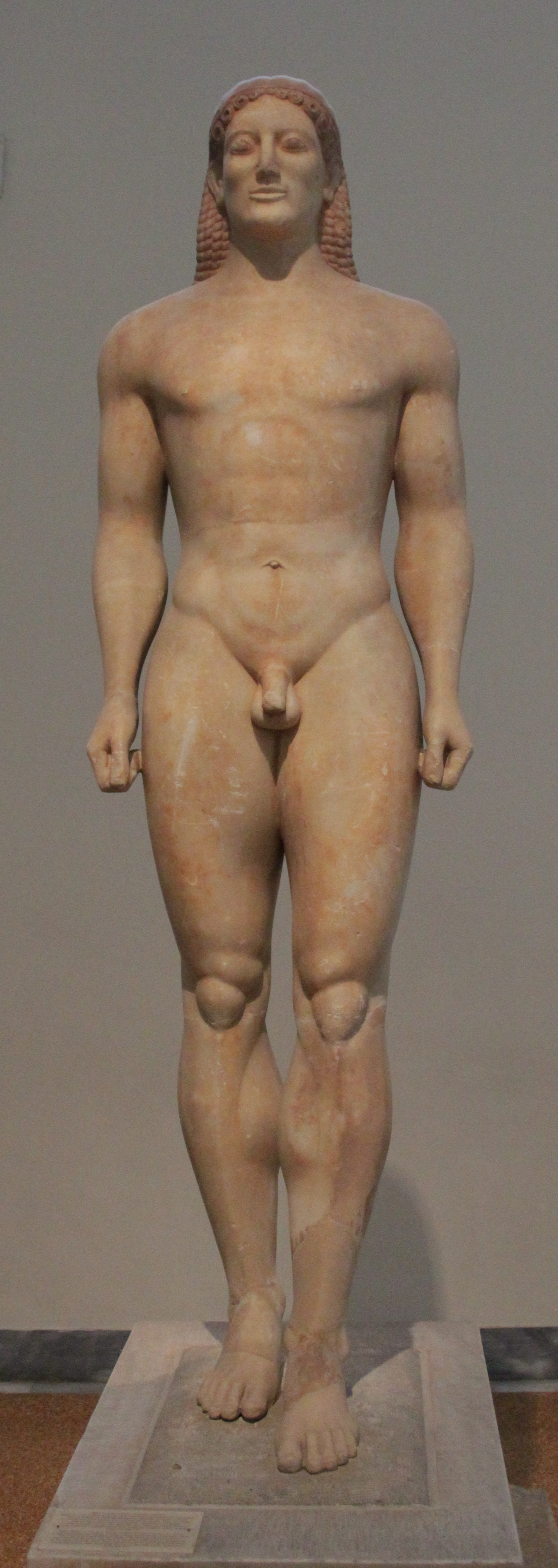 Kouros funerario in marmo pario rinvenuto a Anavyssos (Attica), risalente al VI secolo a.C., oggi esposto al Museo archeologico nazionale di Atene.